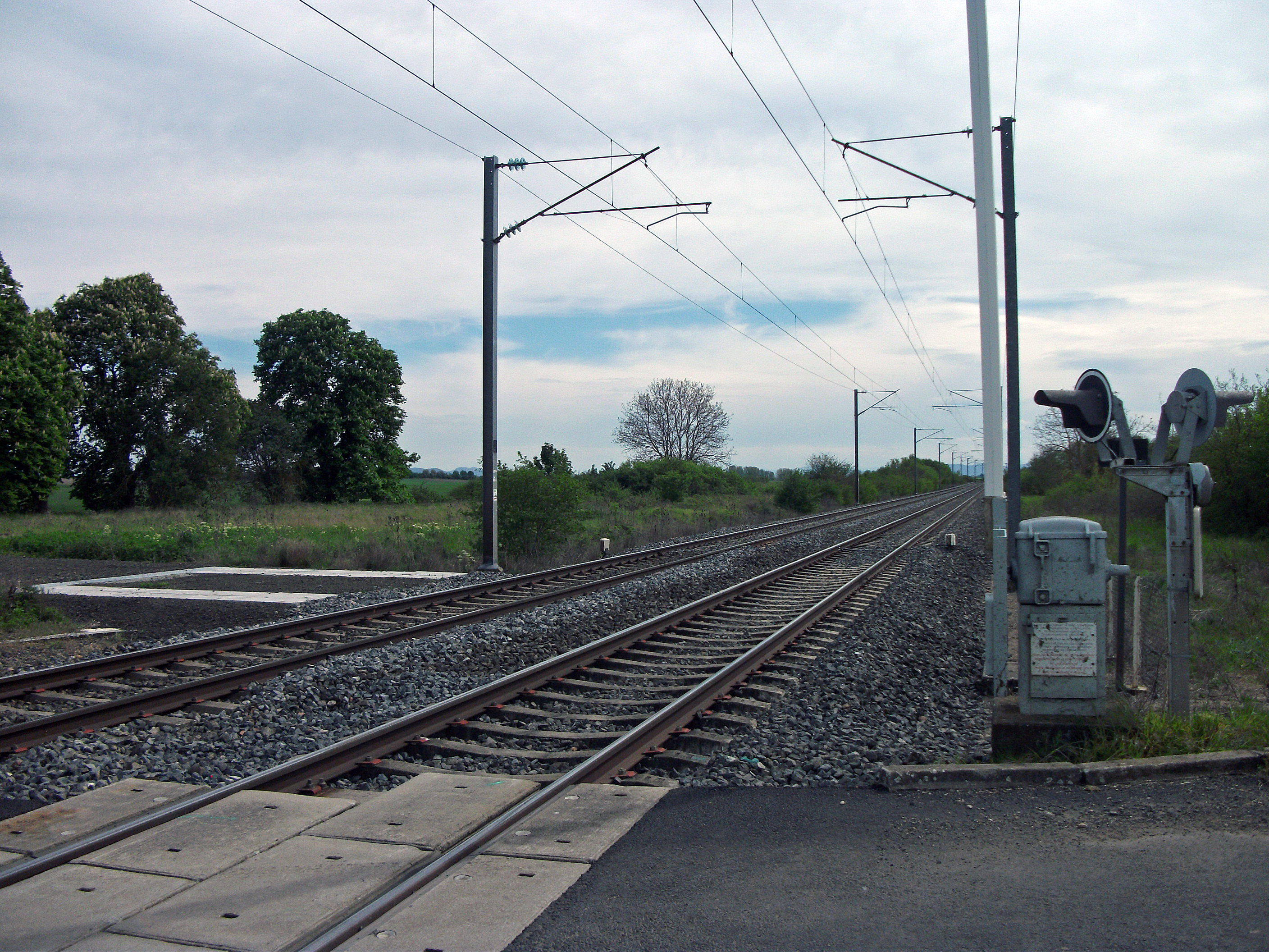 Level crossing #23 / Passage à niveau 23 ligne Vichy à Riom near / près de Surat [10782]